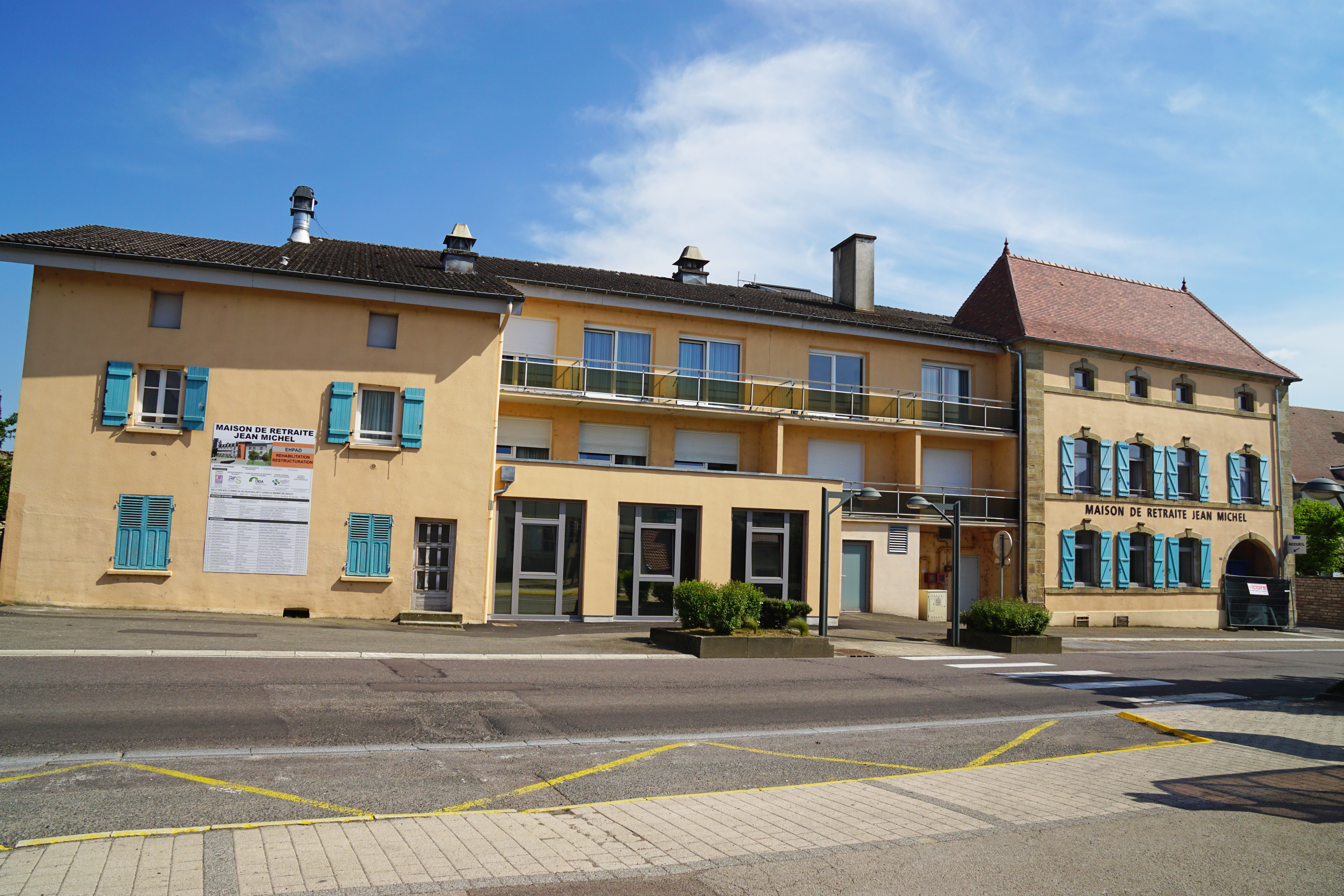 La maison de retraite Jean Michel (EPHAD) de Saulx (Haute-Saône).